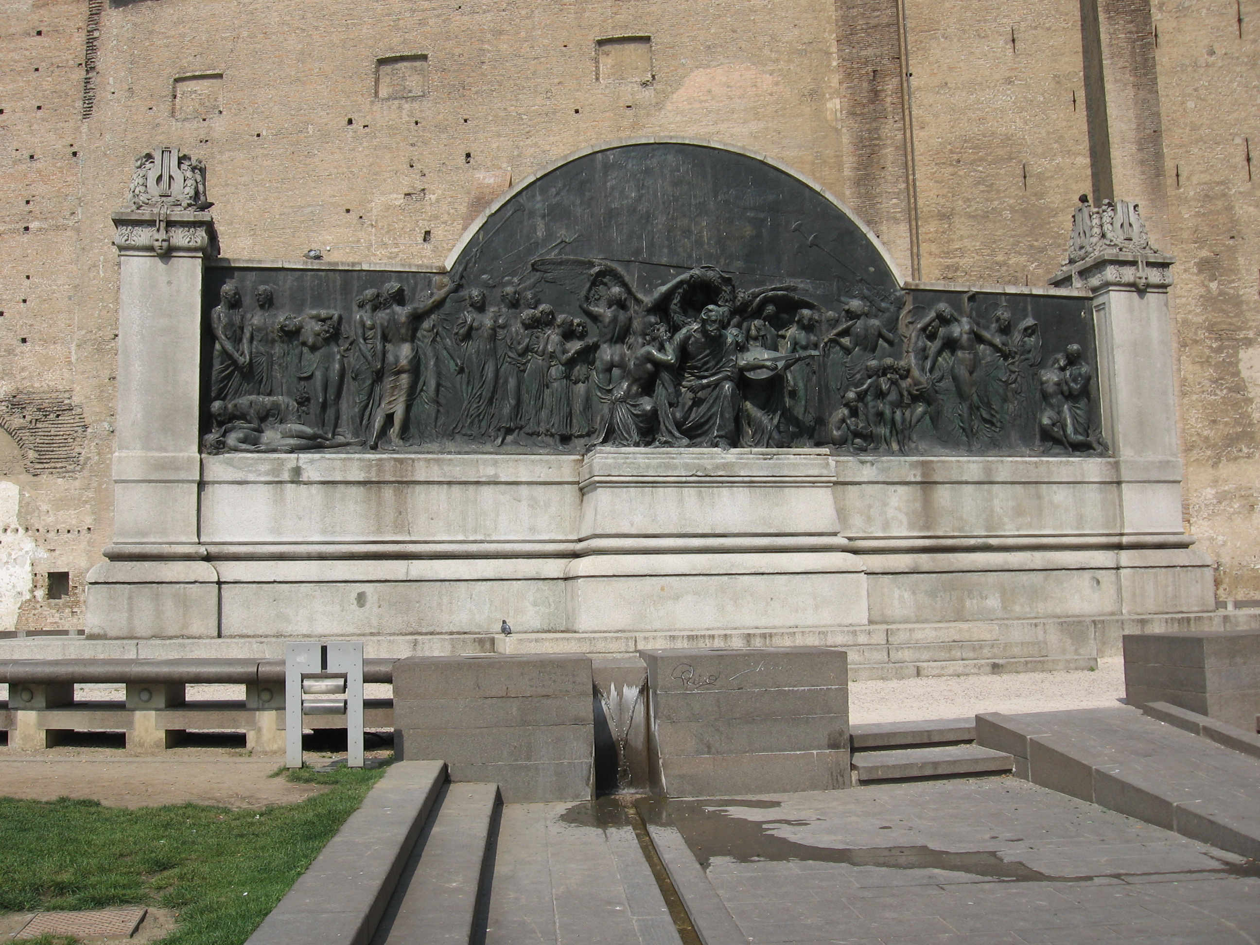 Parma, monumento a Giuseppe Verdi, opera di Ettore Ximenes